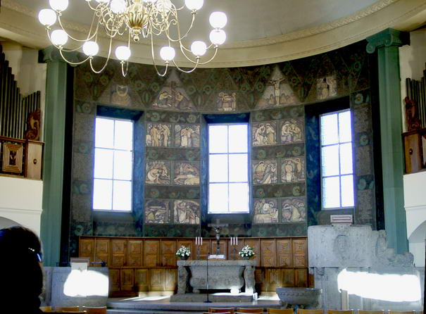 GFDL Evang. Kirche Stuttgart-Gaisburg Wandbilder von Käte Schaller-Härlin von Benutzer:Enslin fotografiert am 20.11.2004 Kategorie:Stuttgart